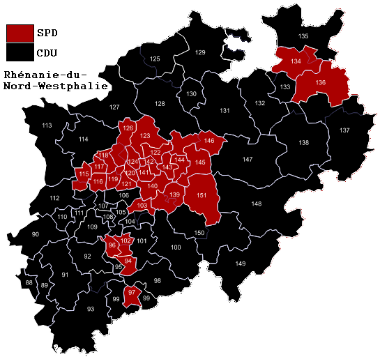 Districts de Rhénanie en 2009.